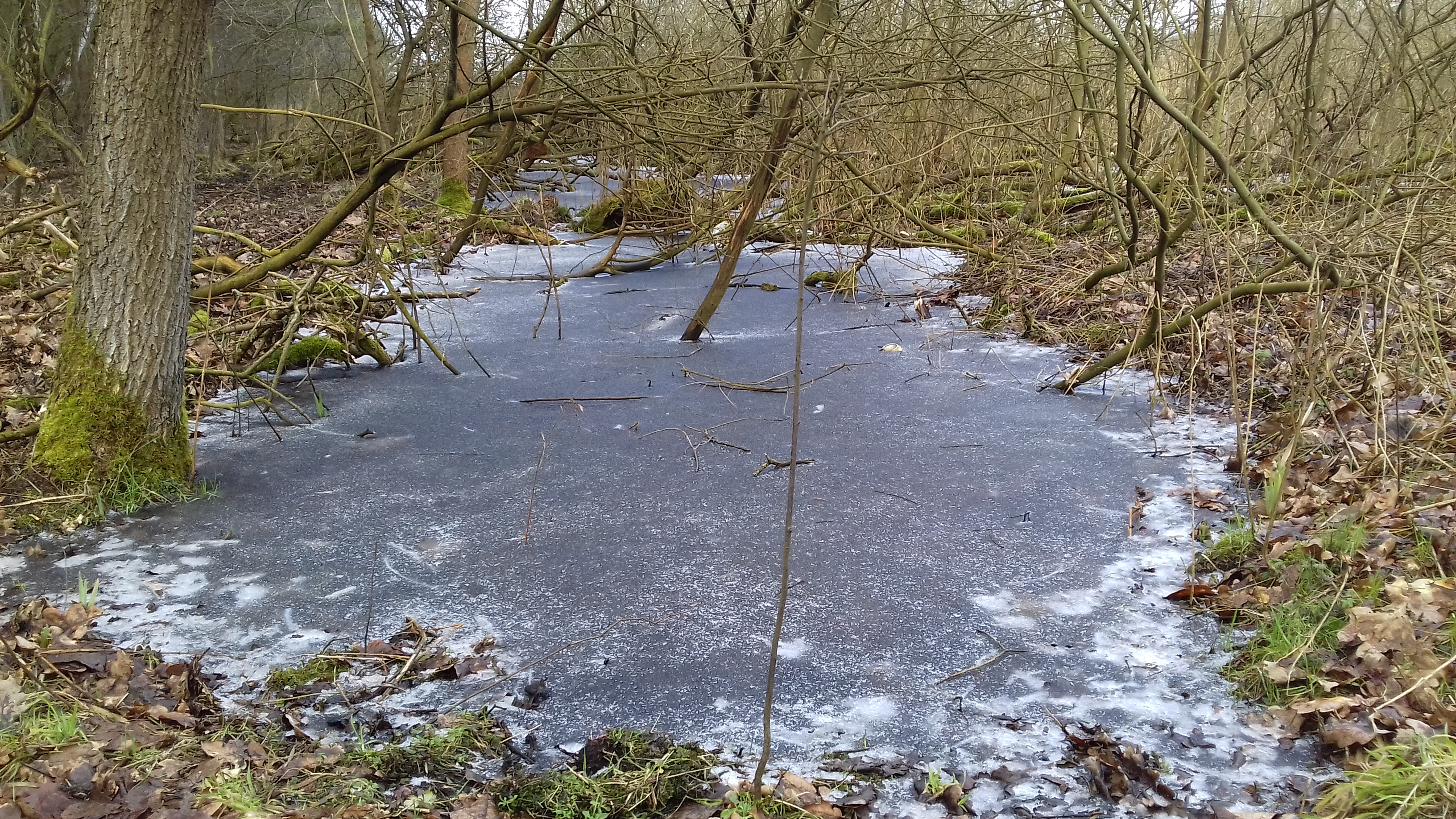 Trzebawka w górnym biegu w rejonie Bagna Dębienko zimą. Przejście szlakiem turystycznym pieszym nr 3589 (zielonym).